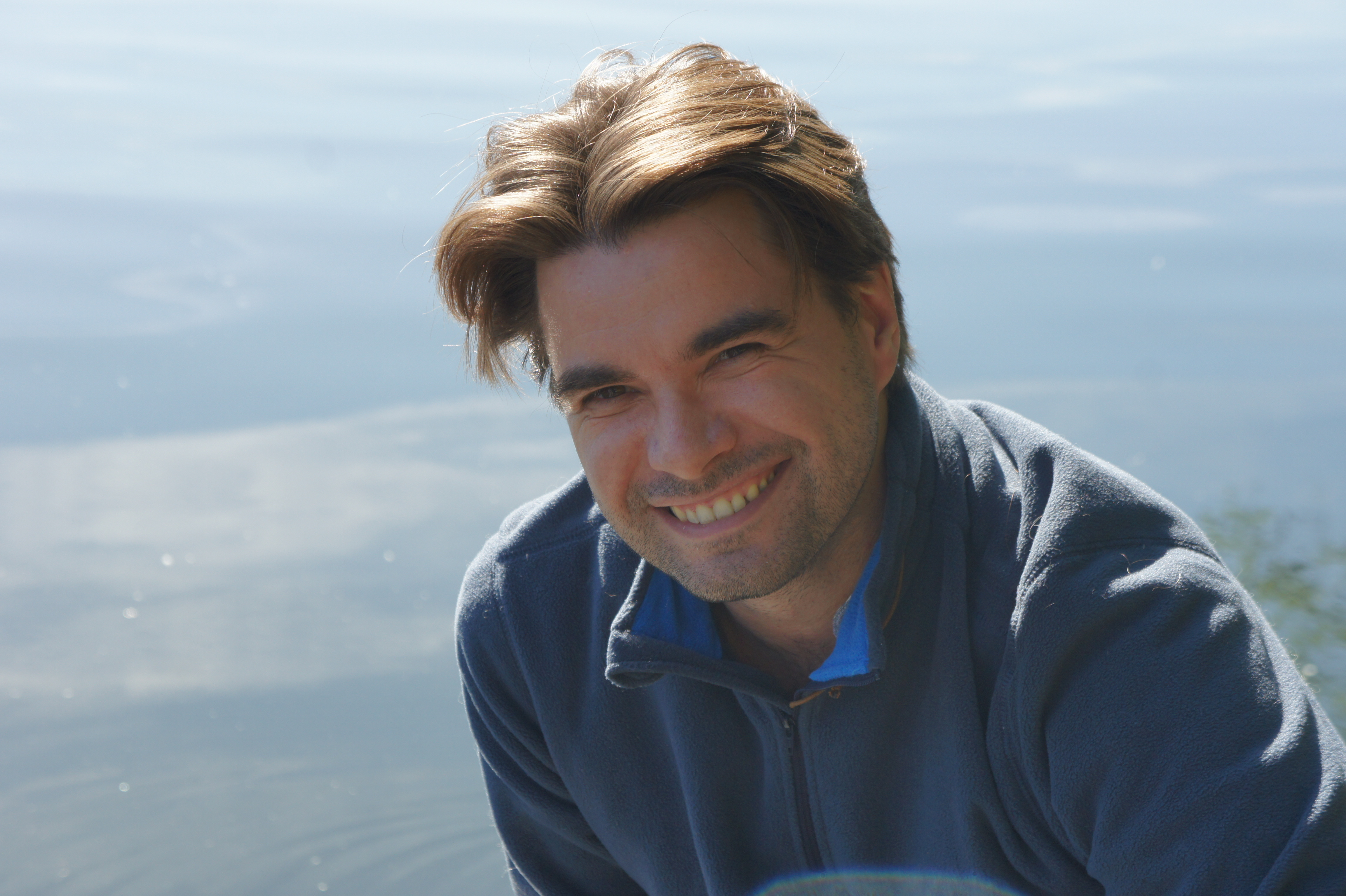 Nicolas Horvath pendant un pèlerinage à Santiago